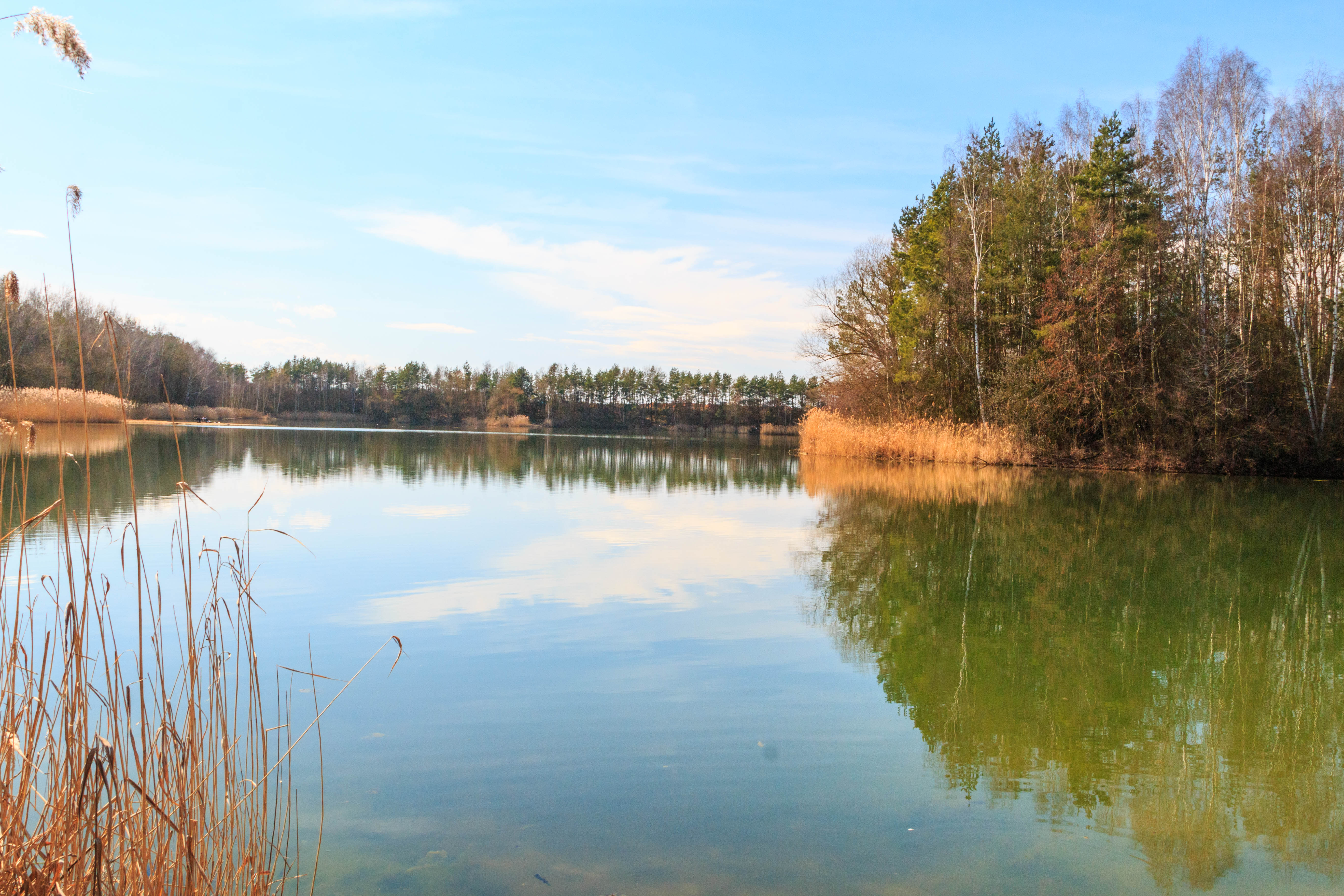 Třesické písníky - jezero II Project: Vodstvo.